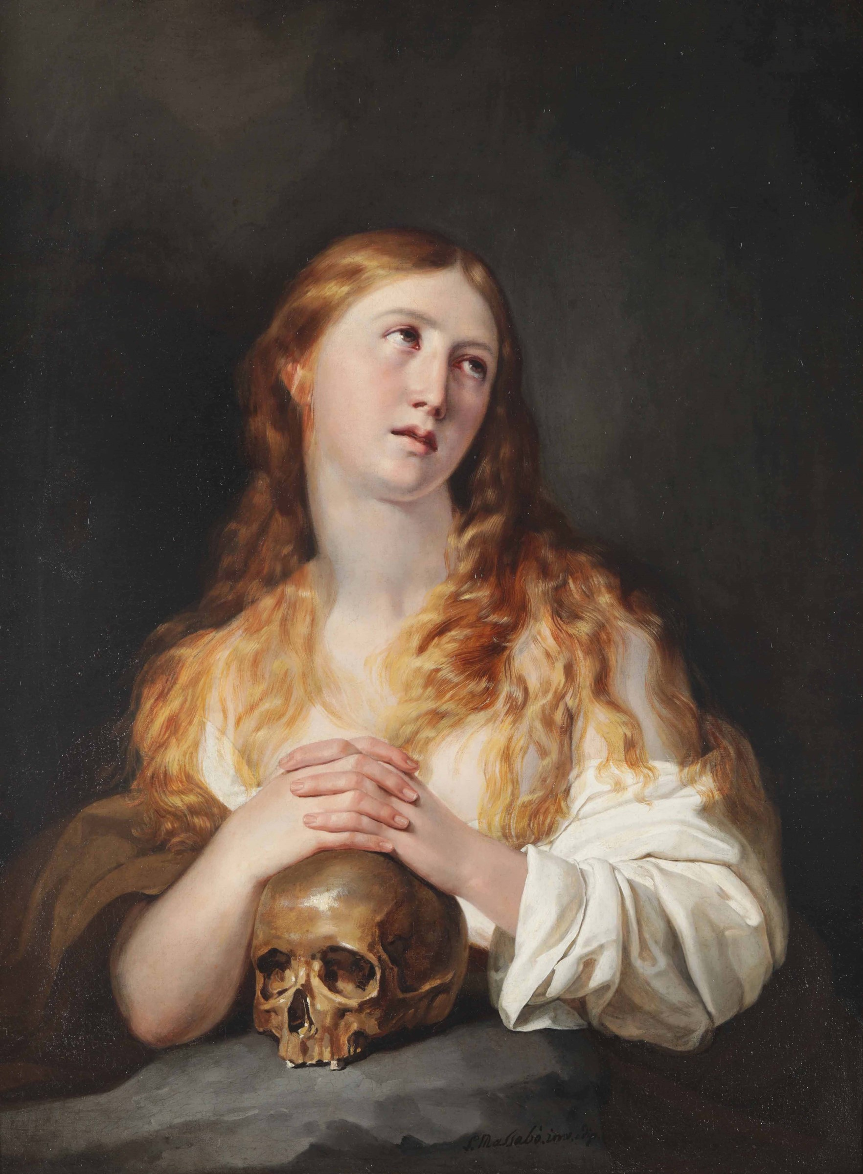 Maria Maddalena, olio su tela, coll. privata